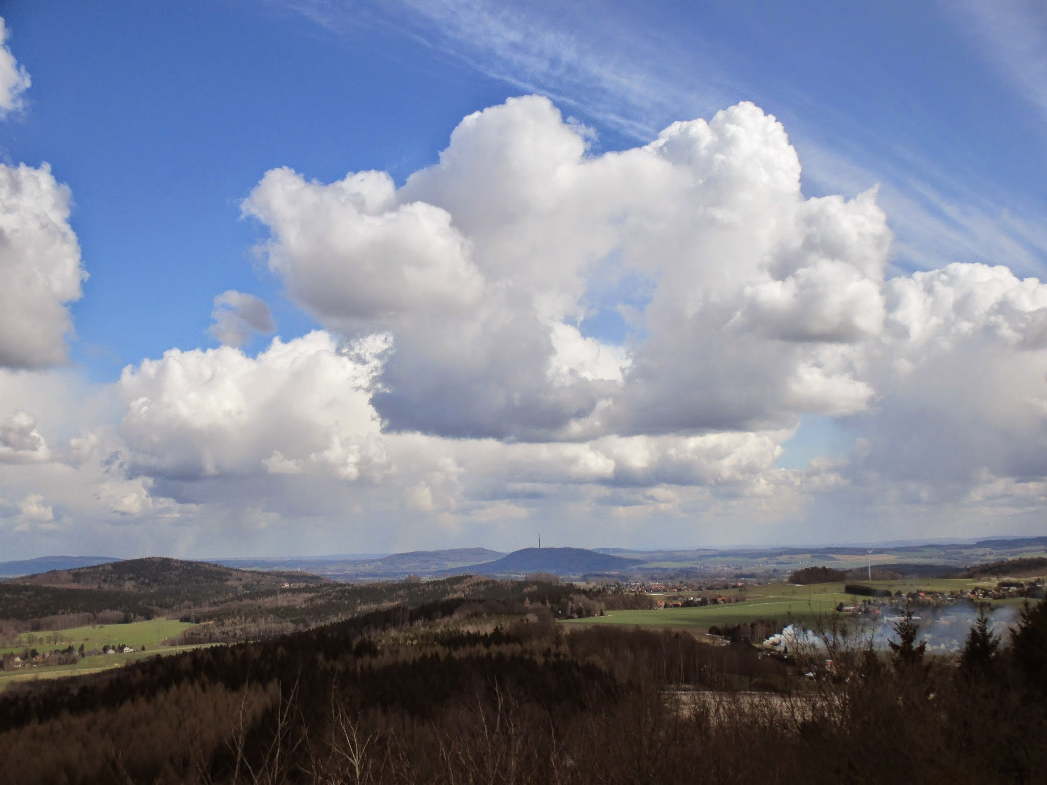 Östliche Blickrichtung vom Turm des Bieleboh, mittig der Löbauer Berg